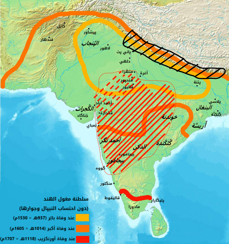 خارطة سلطنة المغول الهنديَّة وفق دُور توسُّعها في زمن كُل سُلطان.